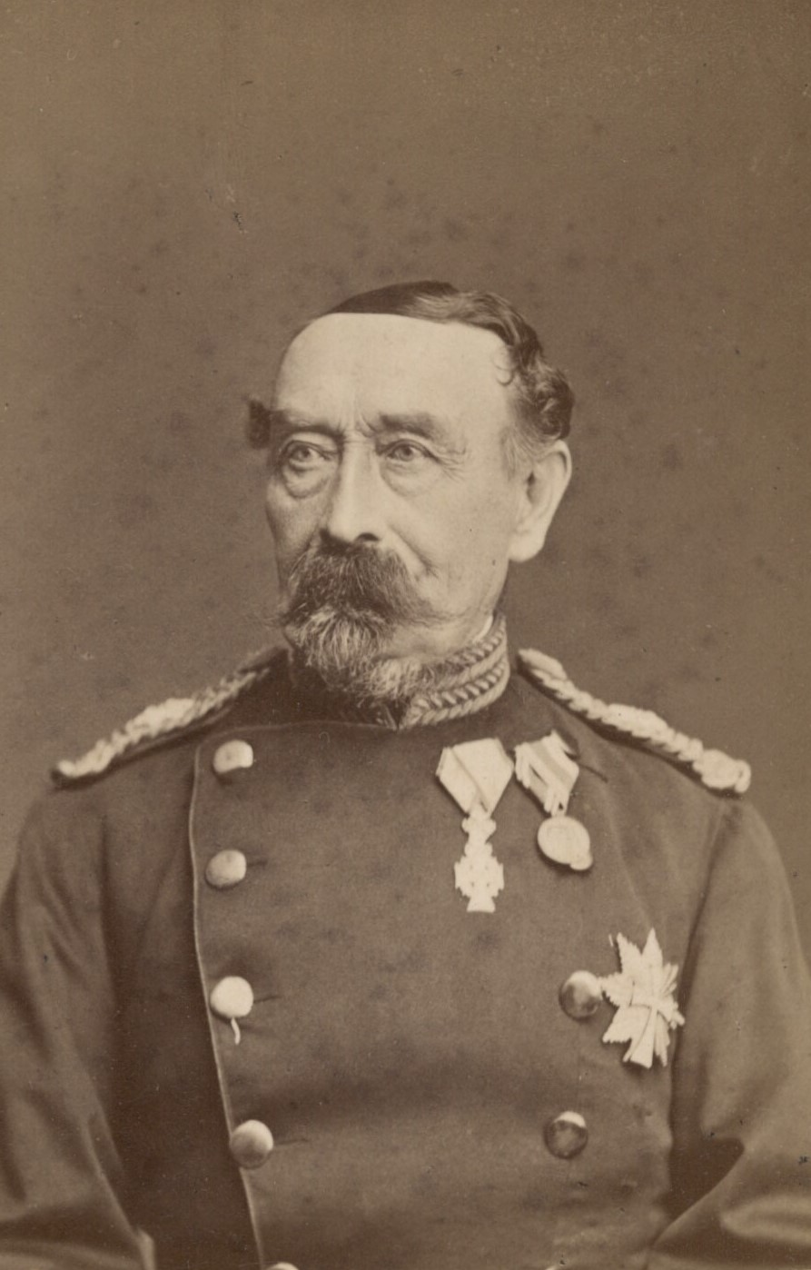 Paul Ulrich Scharffenberg (1810-1882), Danish general